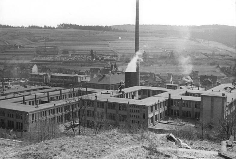 Suhl, VEB Mewa Fahrzeug- und Gerätewerk Simson Zentralbild Kornmann 12.5.1959 VEB Fahrzeug-und Gerätewerk Simson-Suhl Der VEB Fahrzeug-und Gerätewerk Simson-Suhl hat bei der Durchführung des sozialistischen Wettbewerbs gute Erfolge zu verzeichnen. Bis zum Jahresende sollen über den Plan 150 Motorräder, 1200 Mopeds und 120 Jagdgewehre ausgeliefert werden. UBz: Blick auf das Werk (Übersicht)